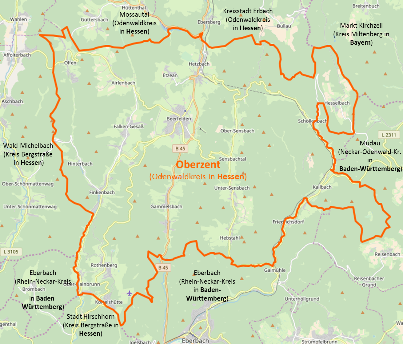 Stadt- und Gemarkungsgrenzen der neuen Stadt Oberzent, im Odenwaldkreis, in Hessen.